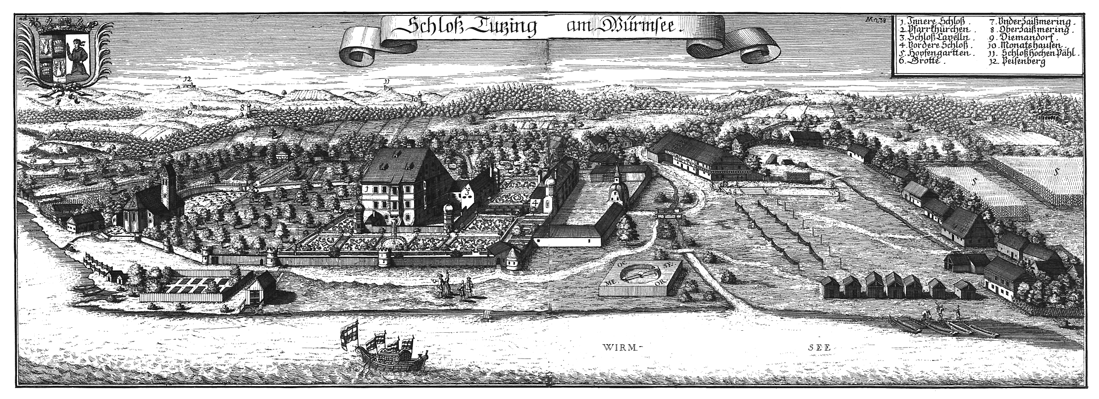 Schloss Tutzing, Kupferstich von Michael Wening um 1700